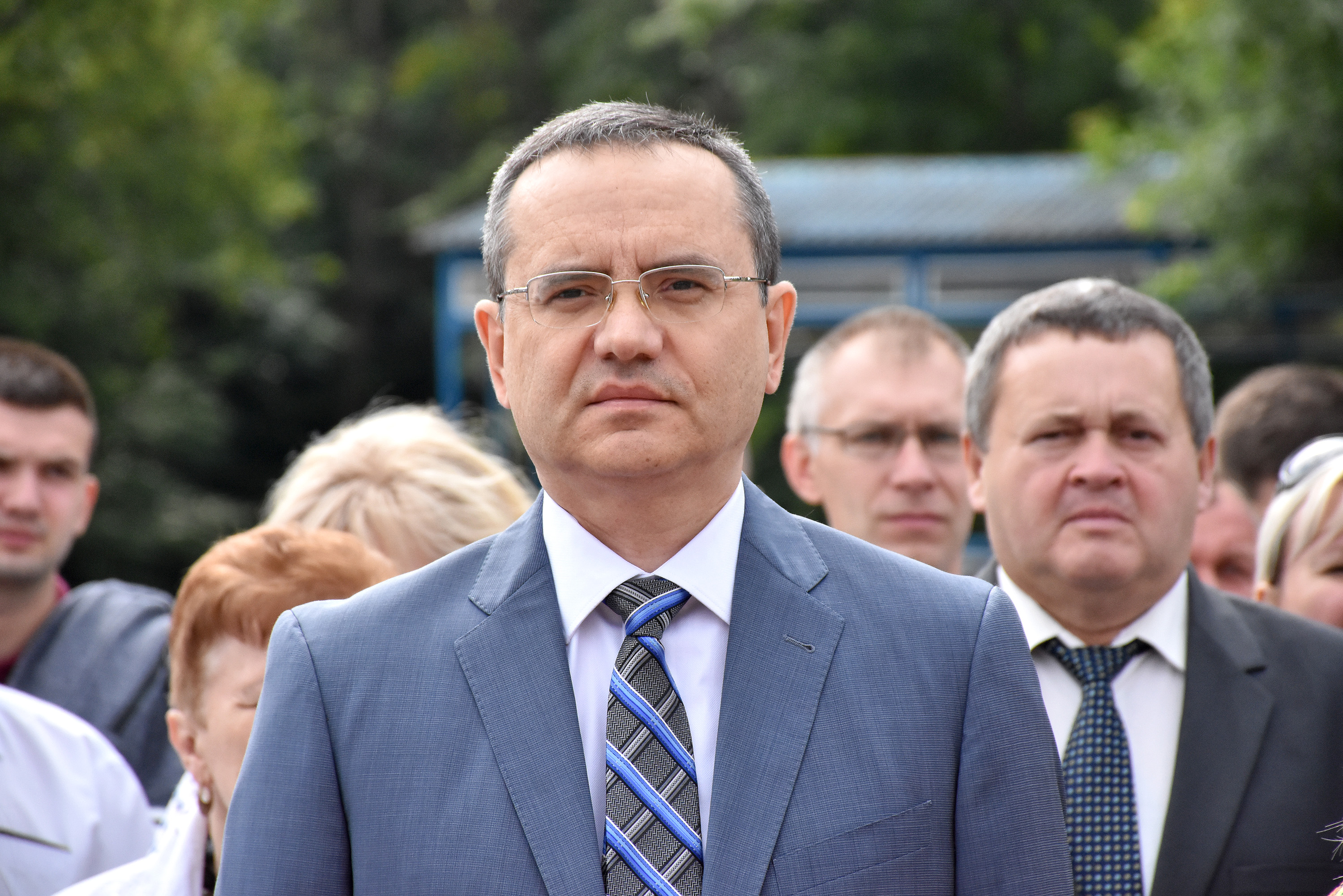 XI Літні міжнародні студентські школи в НОК «Червона калина» Тернопільського державного медичного університету імені І. Я. Горбачевського. Ректор ТДМУ професор Михайло Корда.